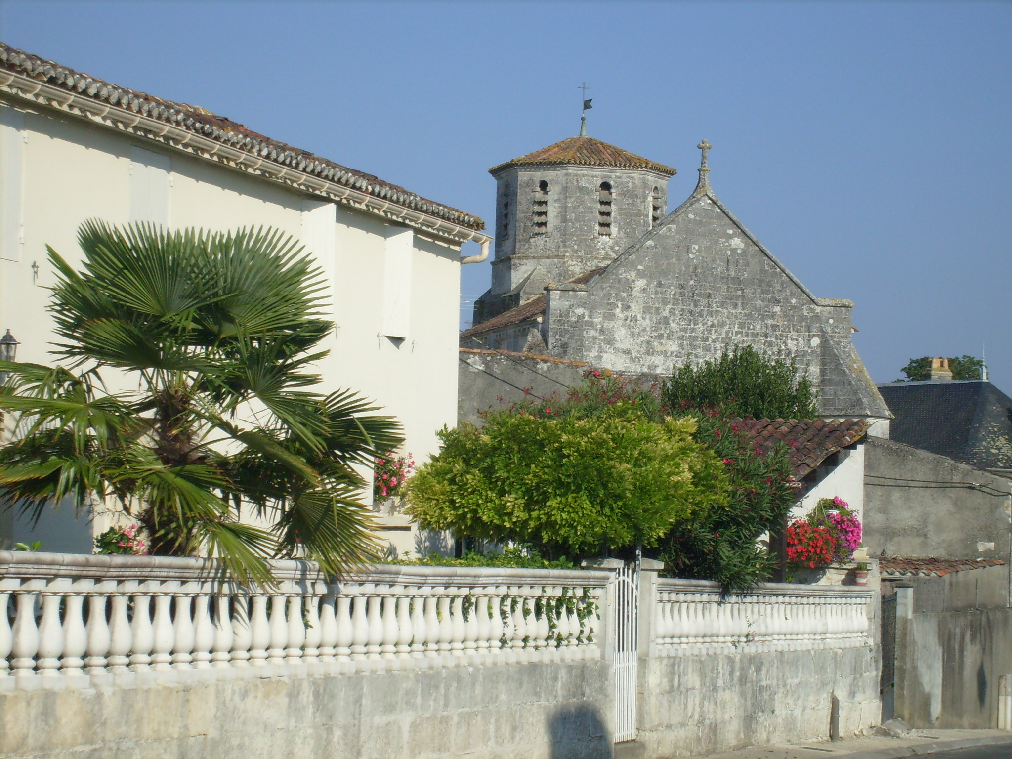 Centre-bourg de Nieul-lès-Saintes